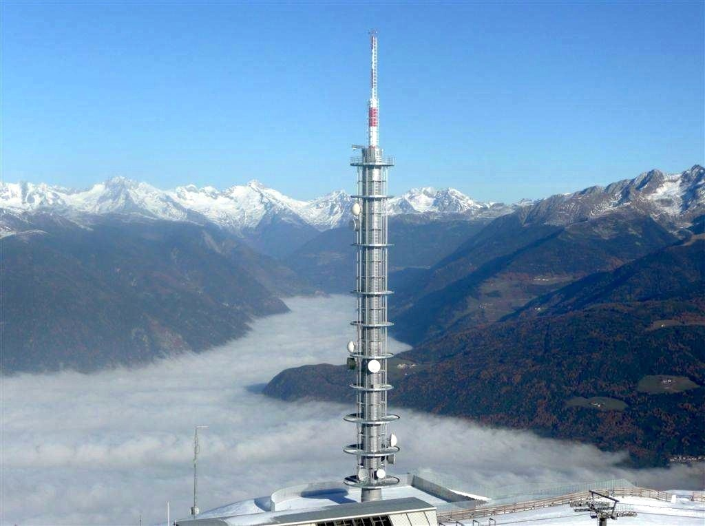 Die neue Sendeanlage der RAS auf dem Kronplatz